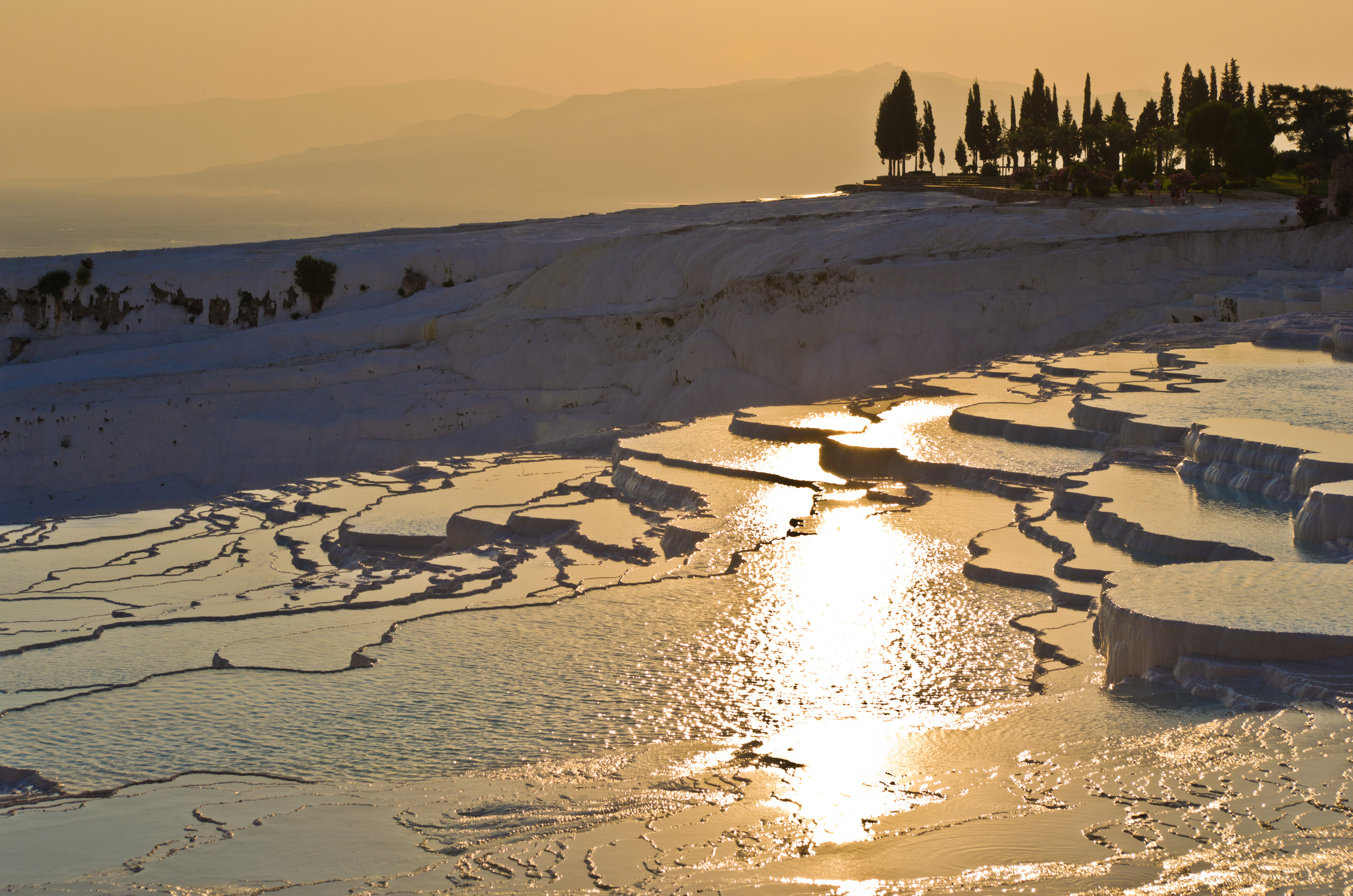 Pamukkale